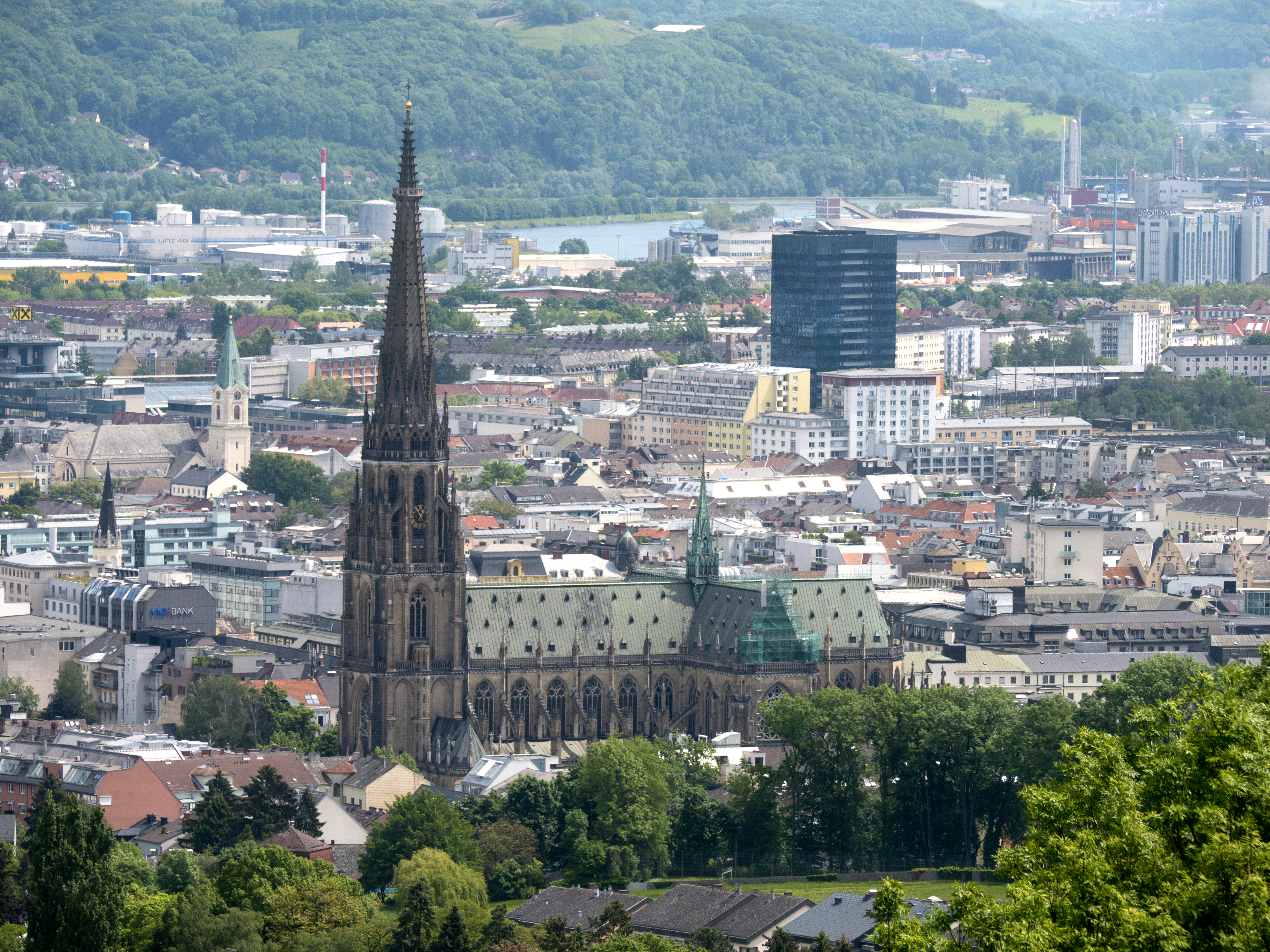 Linzer Dom von der Franz Josefs-Warte an Freinberg